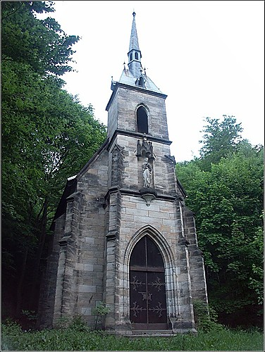 Telnice - kaple